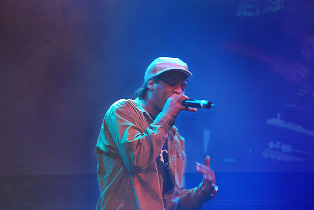 Indie Hip-Hop - Sesc Santo André - SP - Brasil.